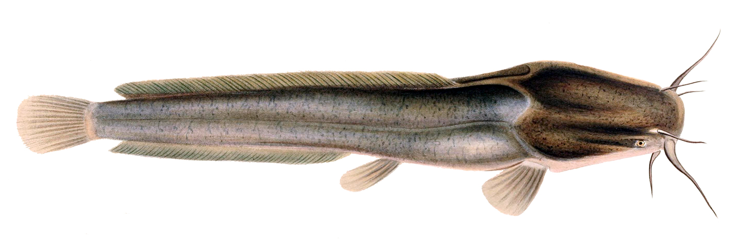 Clarias gariepinus